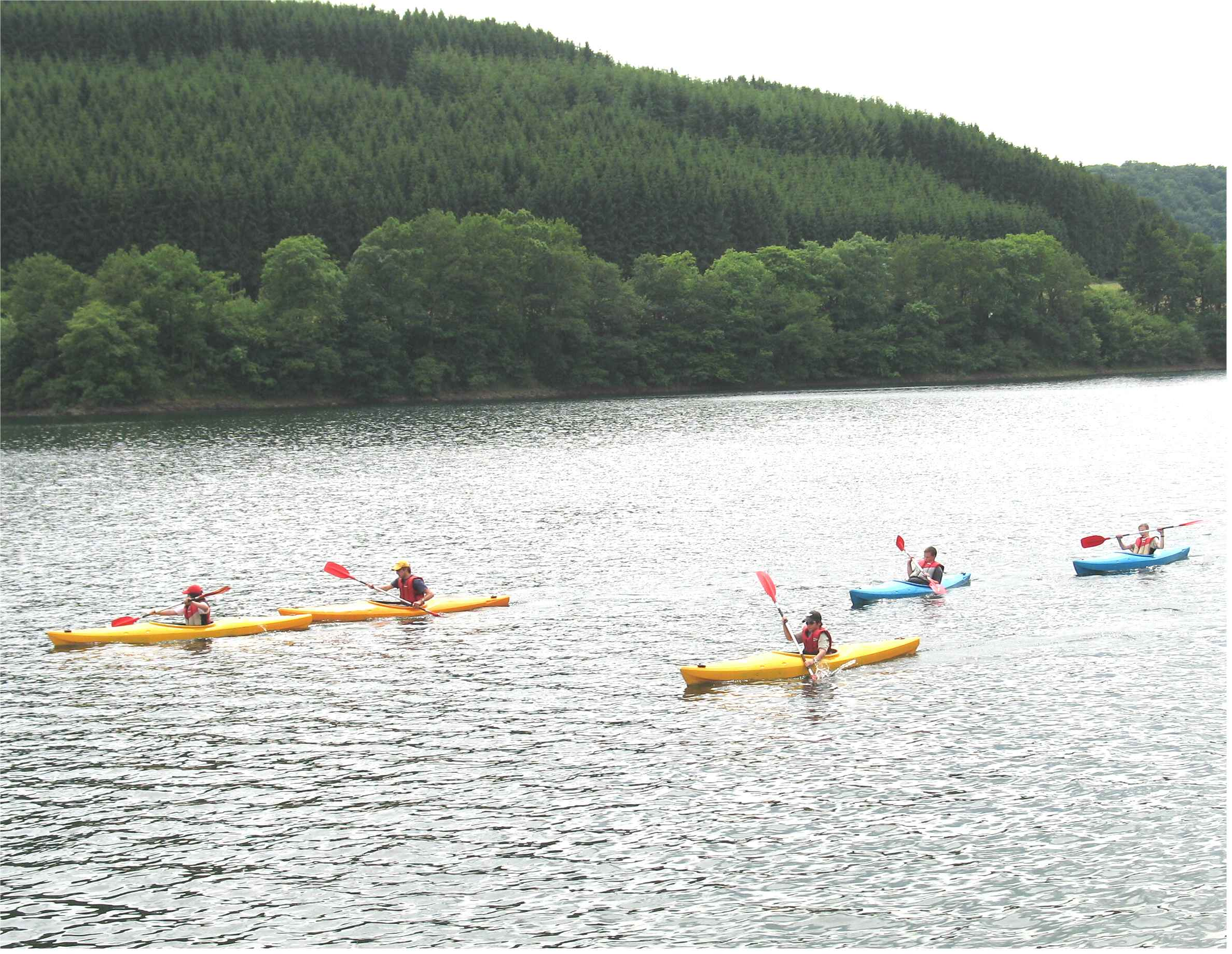 Vue op de Stauséi bei Léifreg.